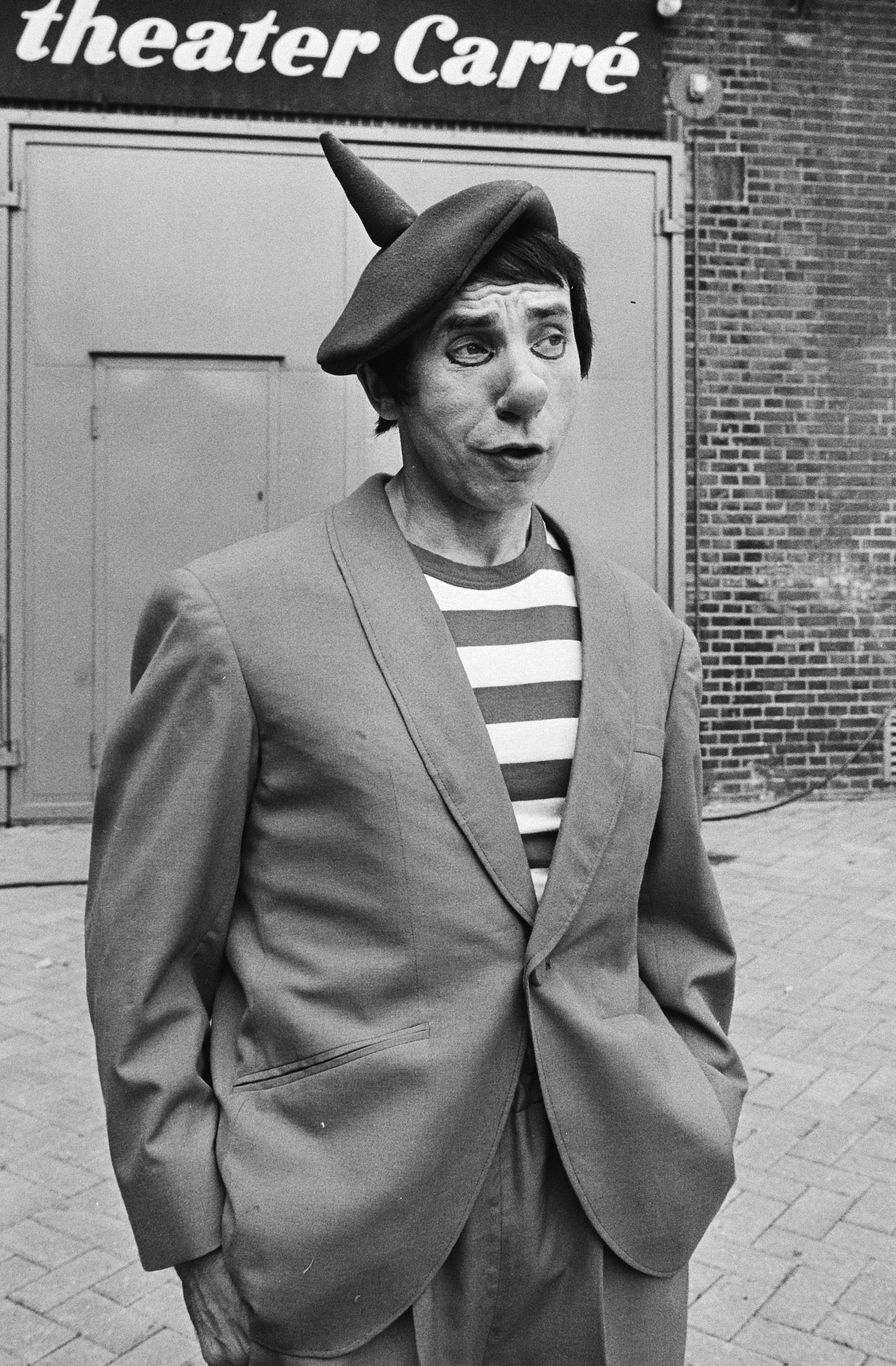 Clown André Nikolajev